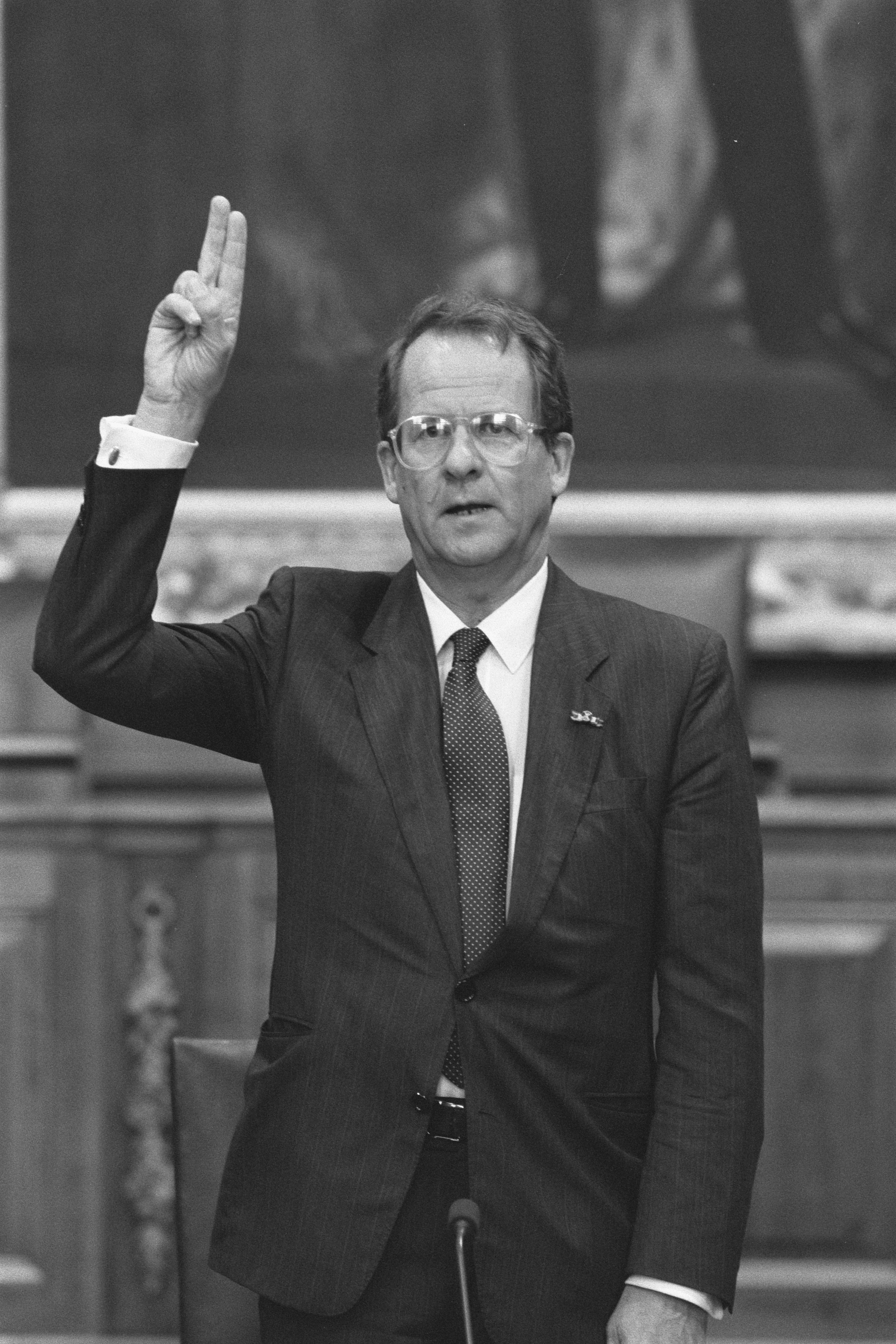 Collectie / Archief : Fotocollectie Anefo Reportage / Serie : [ onbekend ] Beschrijving : Parlementaire enquete bouwsubsidies; ex staatssecr. Brokx legt eed af Datum : 26 oktober 1987 Locatie : Den Haag, Zuid-Holland Trefwoorden : parlementaire enquêtes, politiek Persoonsnaam : Brokx, Gerrit Fotograaf : Croes, Rob C. / Anefo Auteursrechthebbende : Nationaal Archief Materiaalsoort : Negatief (zwart/wit) Nummer archiefinventaris : bekijk toegang 2.24.01.05 Bestanddeelnummer : 934-1137